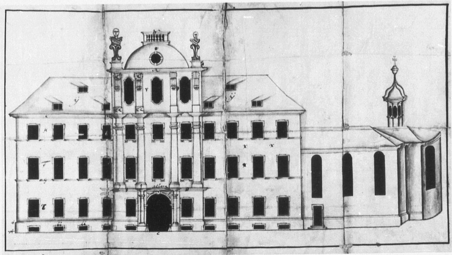 Schloss Wiser in Leutershausen, Entwurf, Schlosskapelle wurde nicht ausgeführt